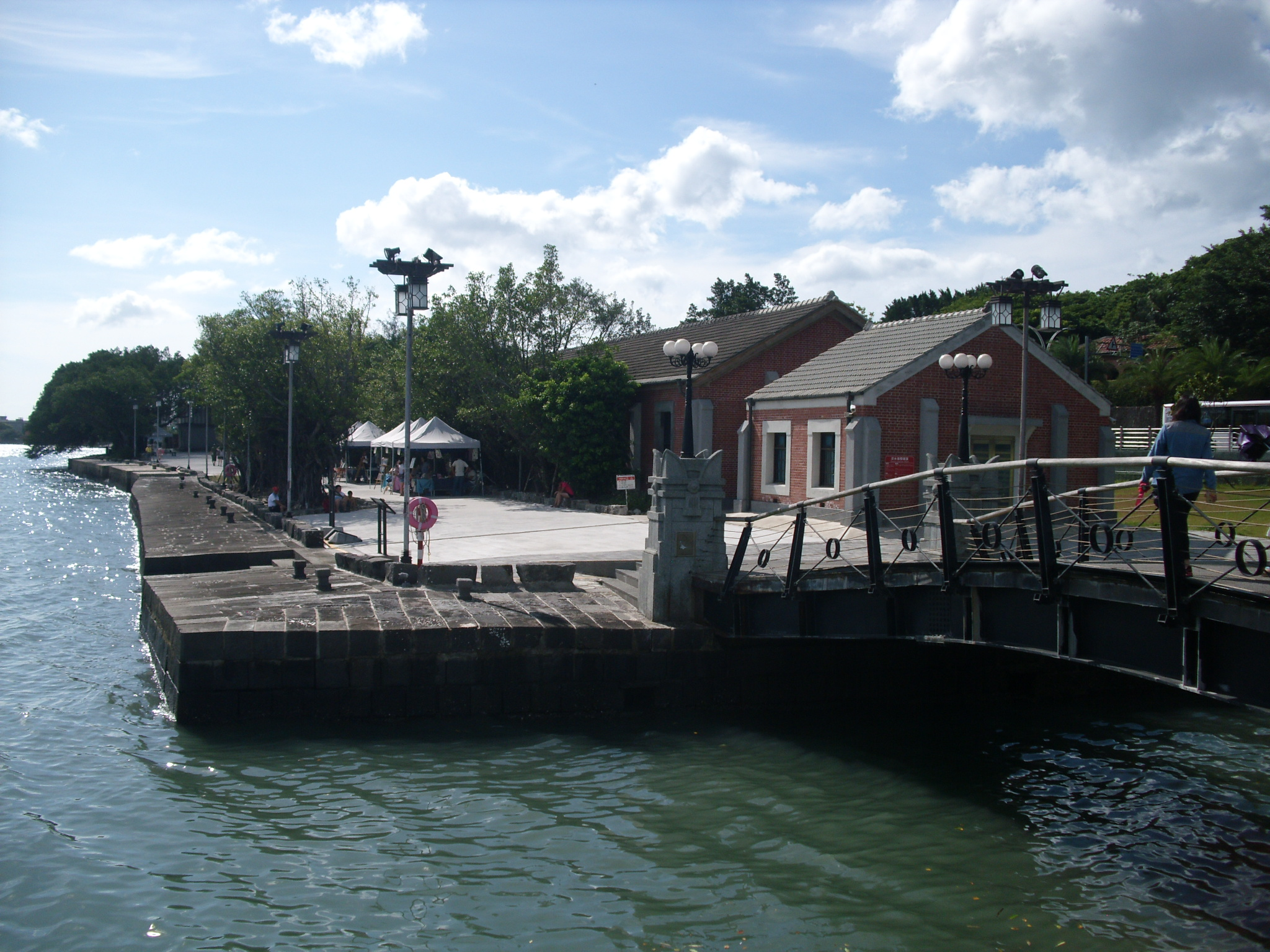 Bân-lâm-gú: 淡水海關碼頭